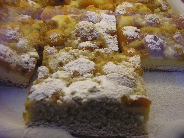 Marhuľový koláč